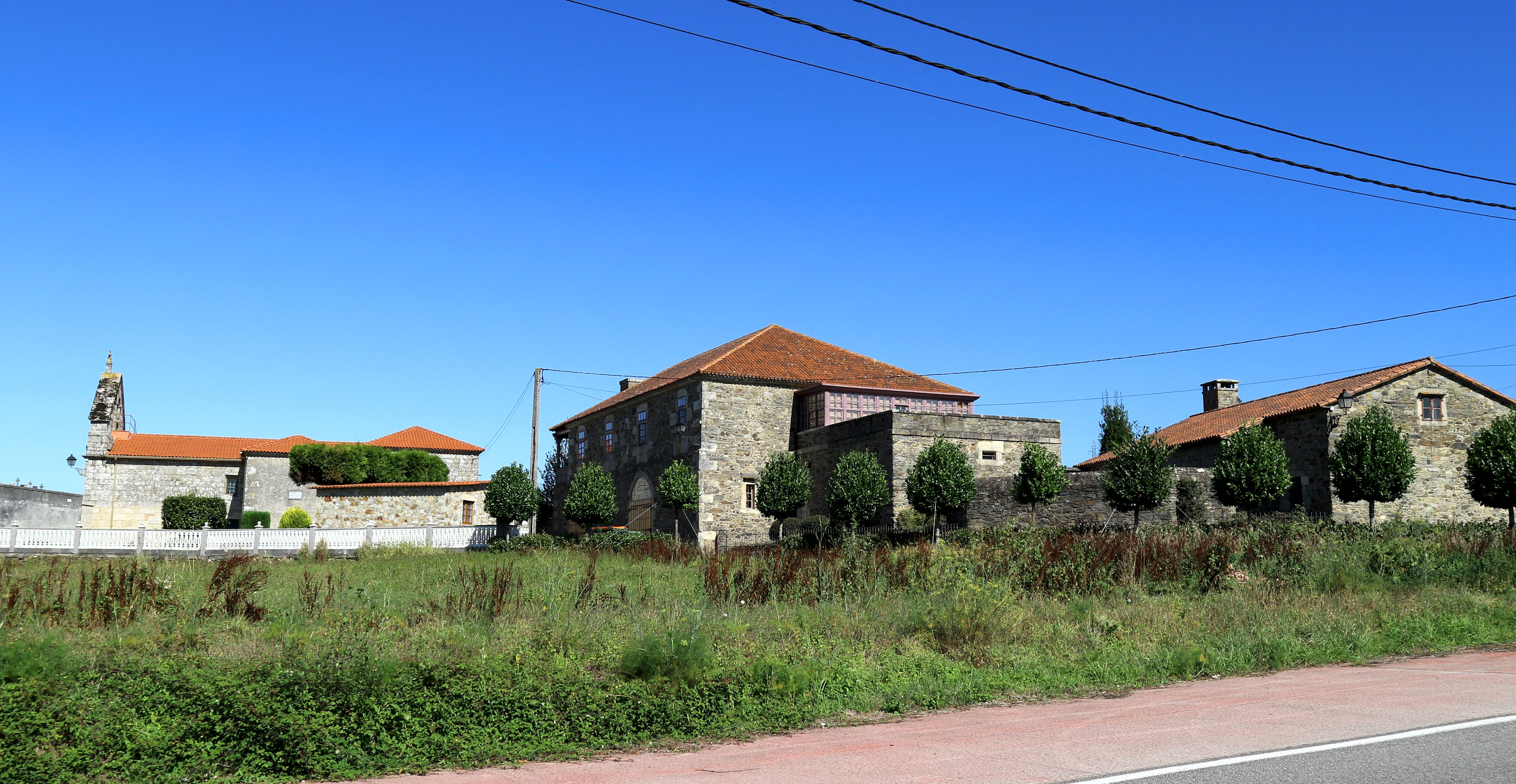 Igrexa de Santo Estevo e Pazo de Piadela, Betanzos.